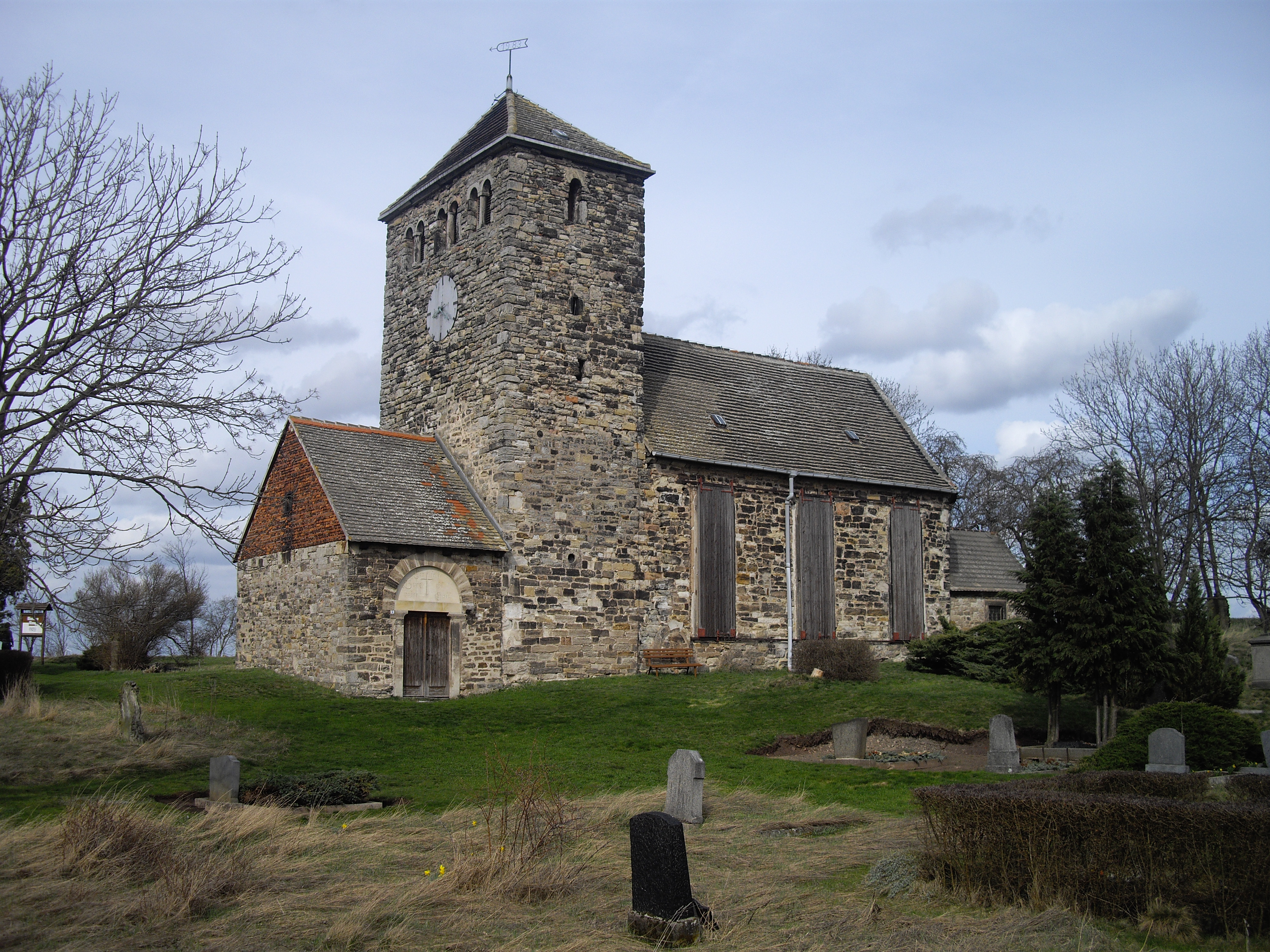 Die Kirche auf dem Burgberg bei Bösenburg, Gerbstedt